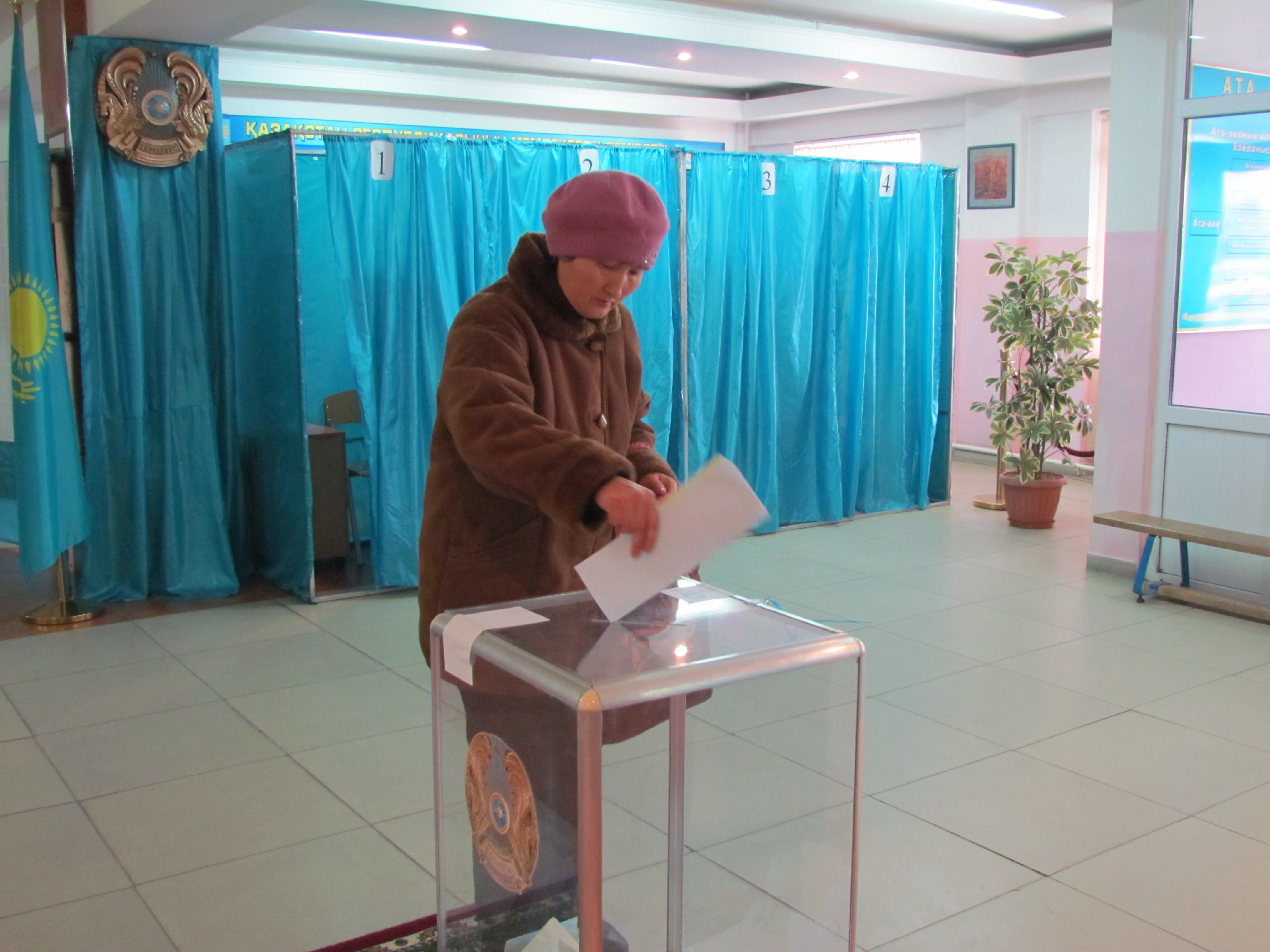 Голосование на участке № 455 в Алма-Ате на внеочередных выборах депутатов мажилиса парламента Республики Казахстан. 15 января 2012 года.